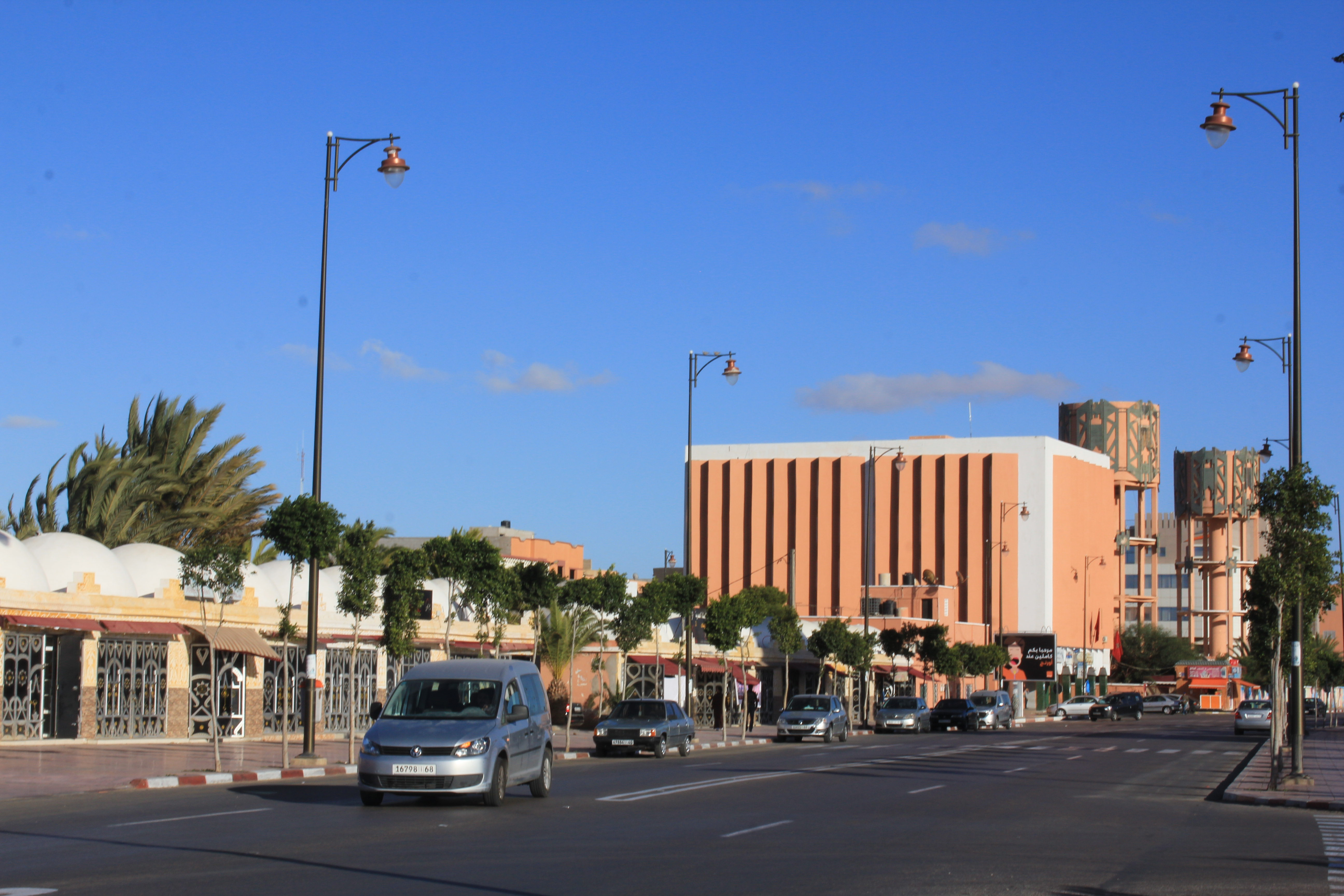 صورة من شارع مكة بمدينة العيون، و تظهر مباني العمارة الإسبانية من فترة الأربعينيات، التي تتميز بتركيبها البسيط و قبابها الدائرية.